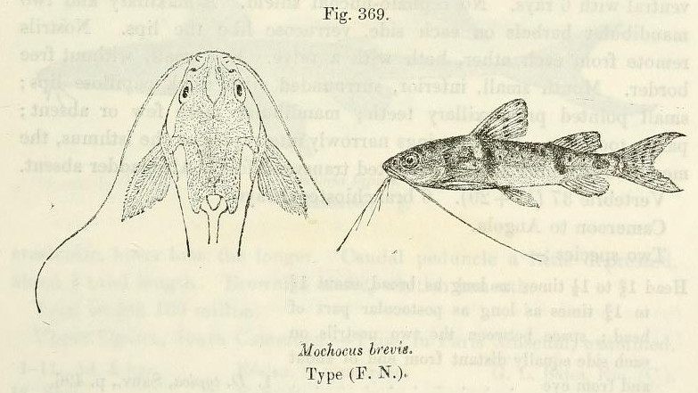 Mochokus brevis